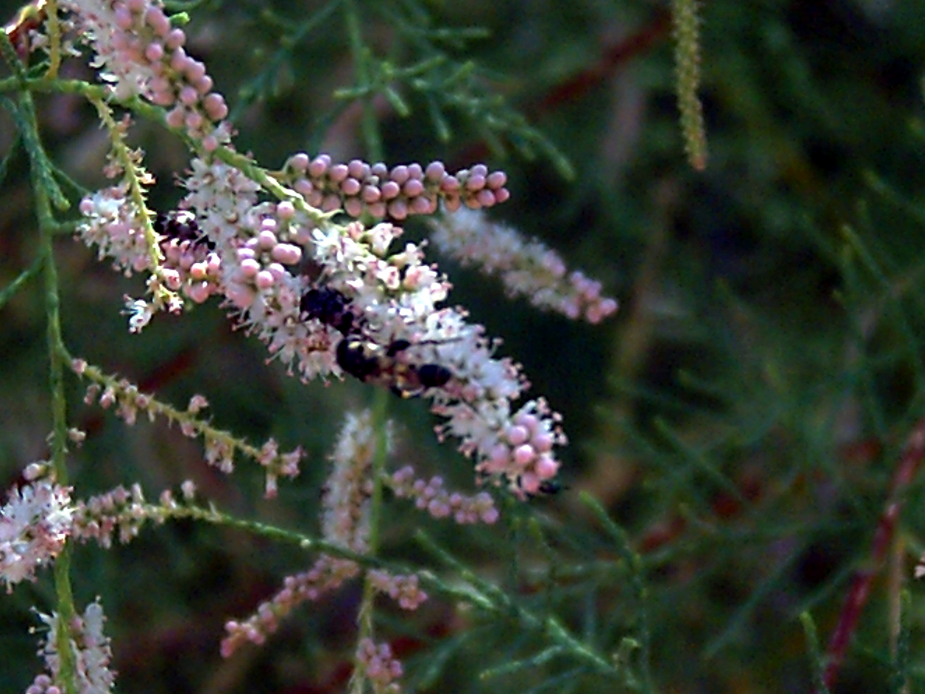 Tamarix gallica flowers Close up Dehesa Boyal de Puertollano